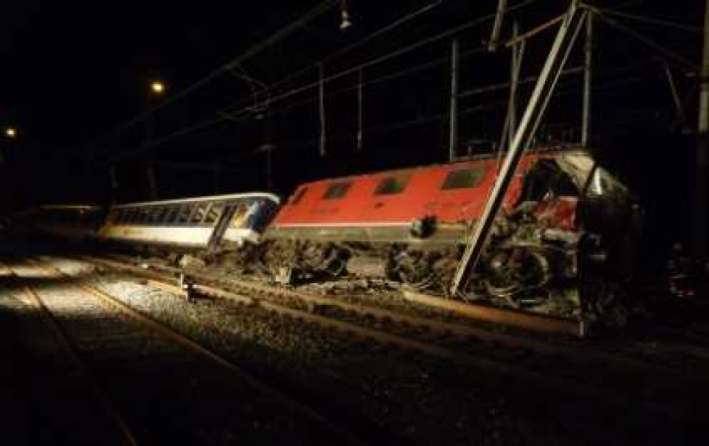 Kollision von zwei Reisezügen am Donnerstag, 6. Oktober 2011 in Olten. Zug 17075 mit Re 420 11184 und B 20-35217-2.